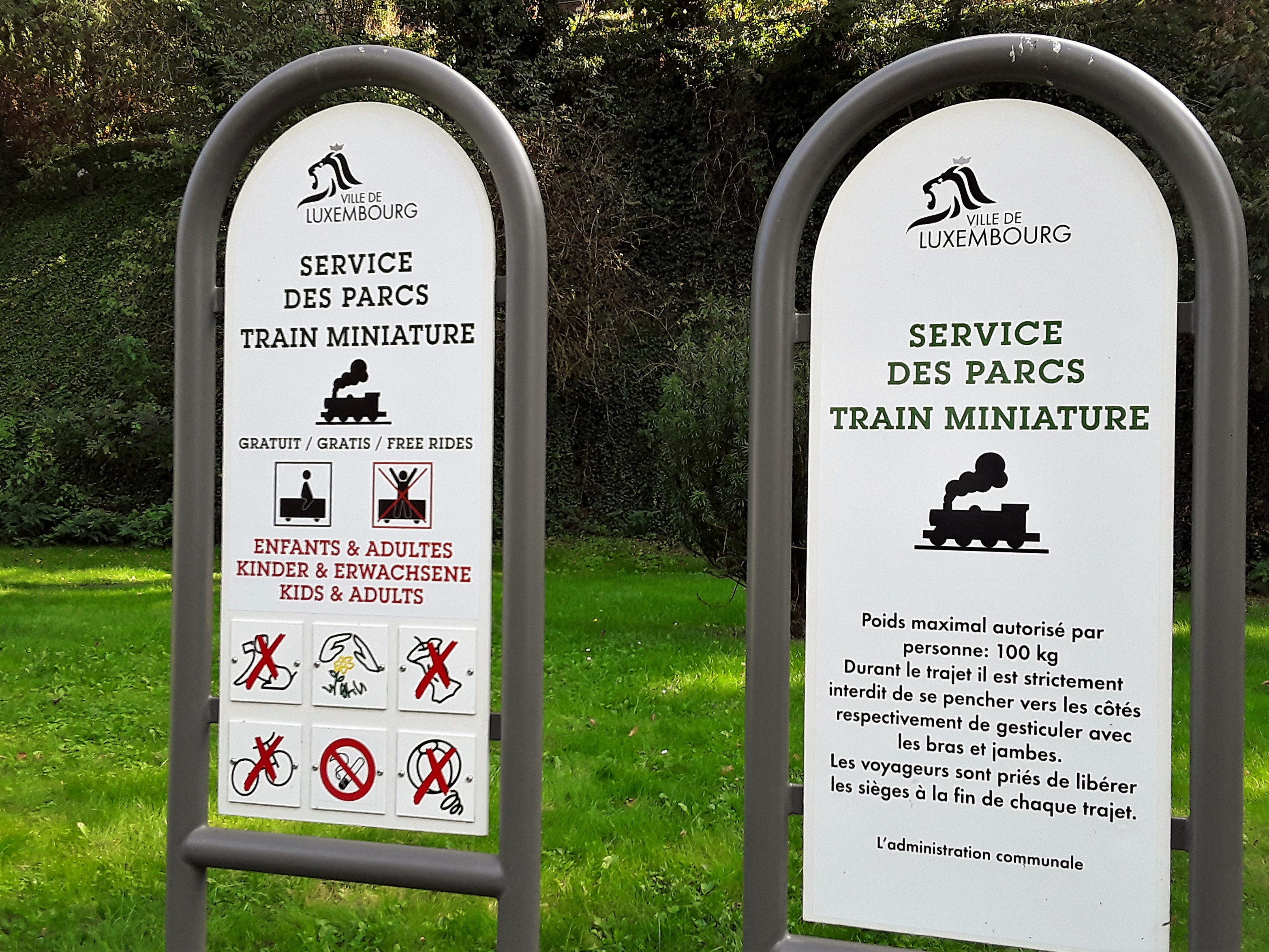 Luxembourg. Train miniature "Péitrussbunn", échelle 1:11, vallée de la Pétrusse. En service entre 2004 et 2020.